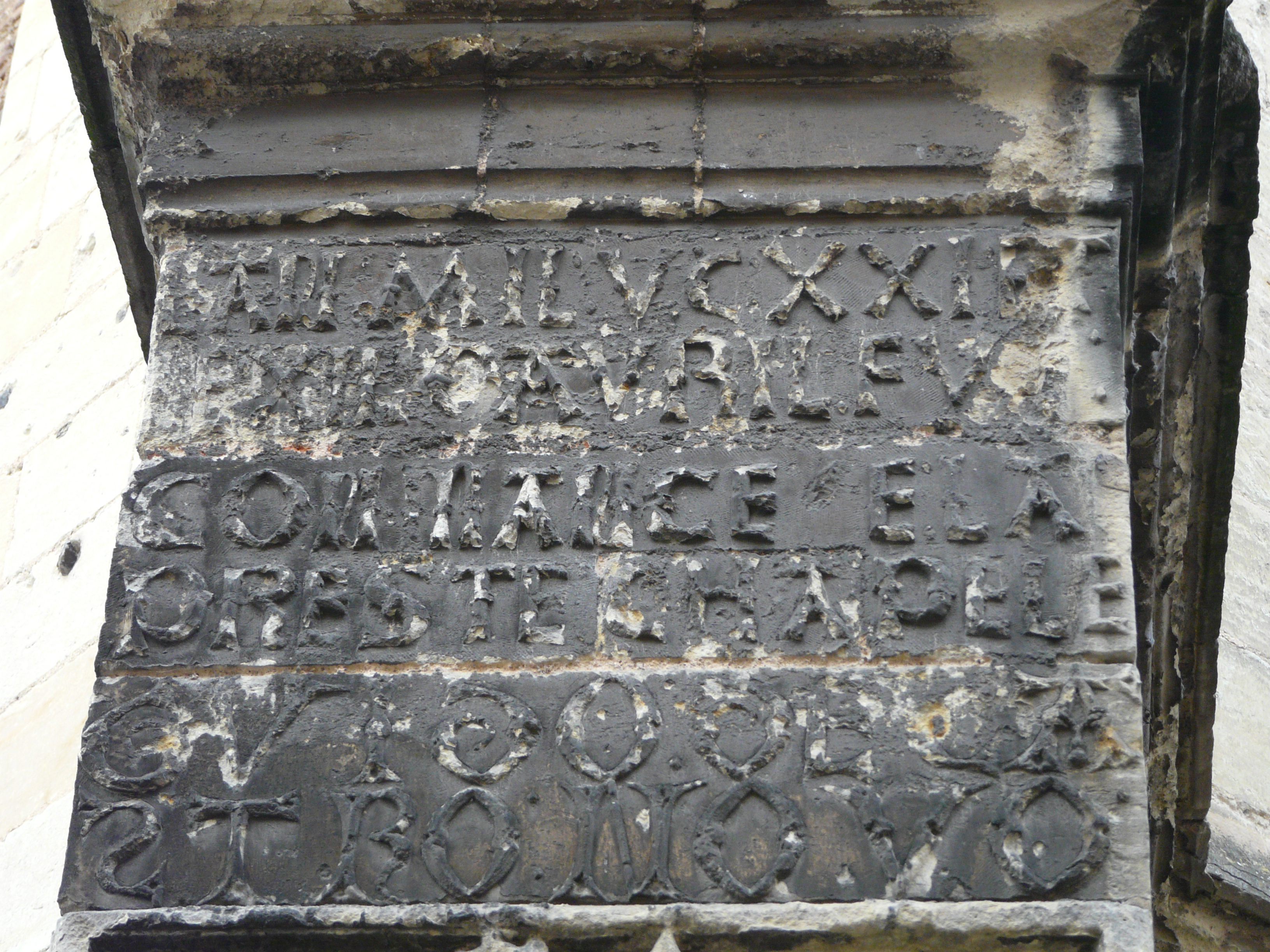 Inscription sur le contrefort sud-est de la chapelle Saint-Jean-Baptiste, Périgueux, Dordogne, France.